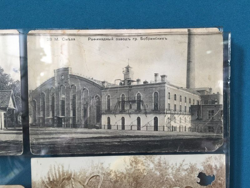 Старое фото